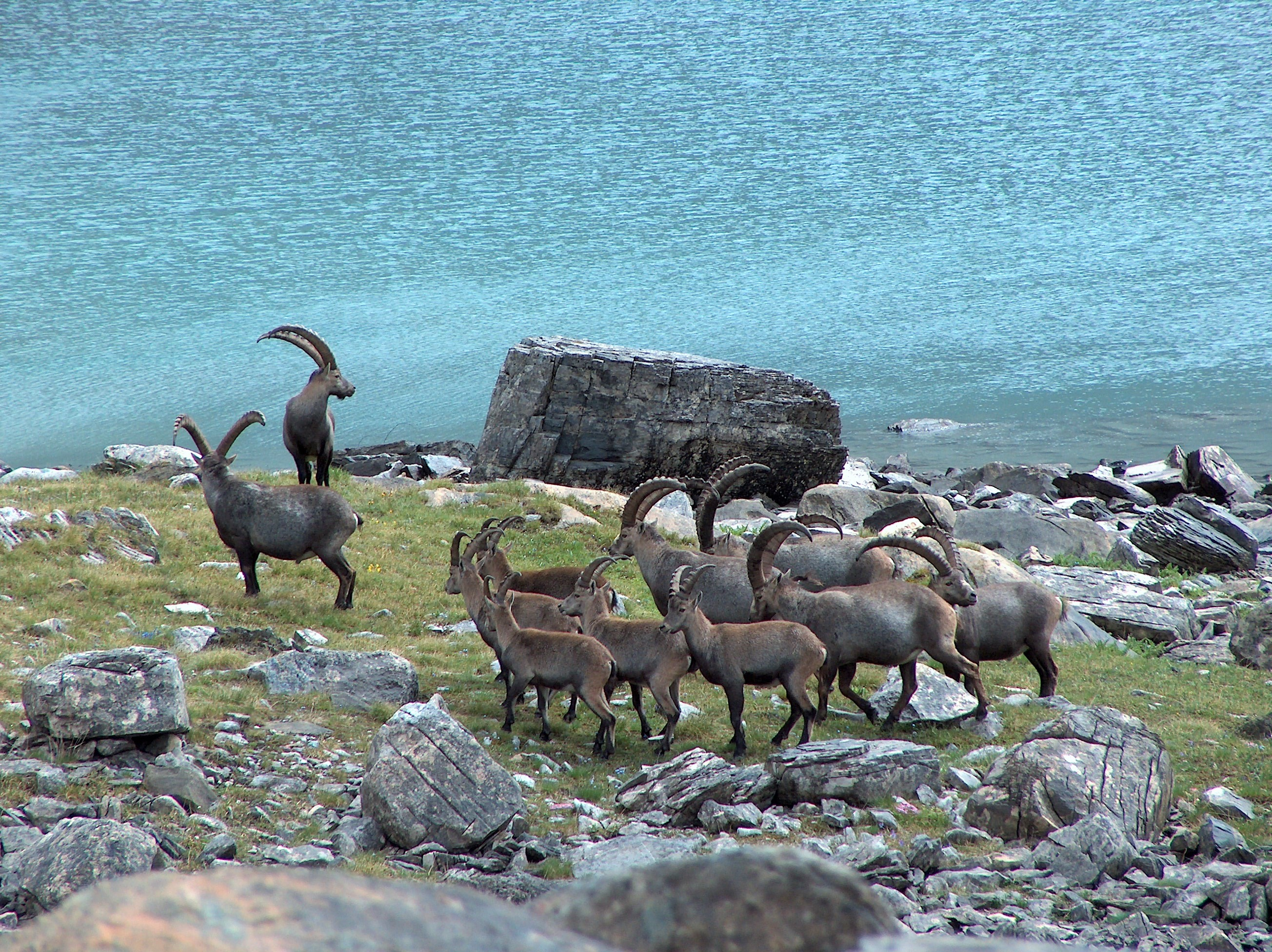 Bouquetins au lac long , Parc national de la Vanoise